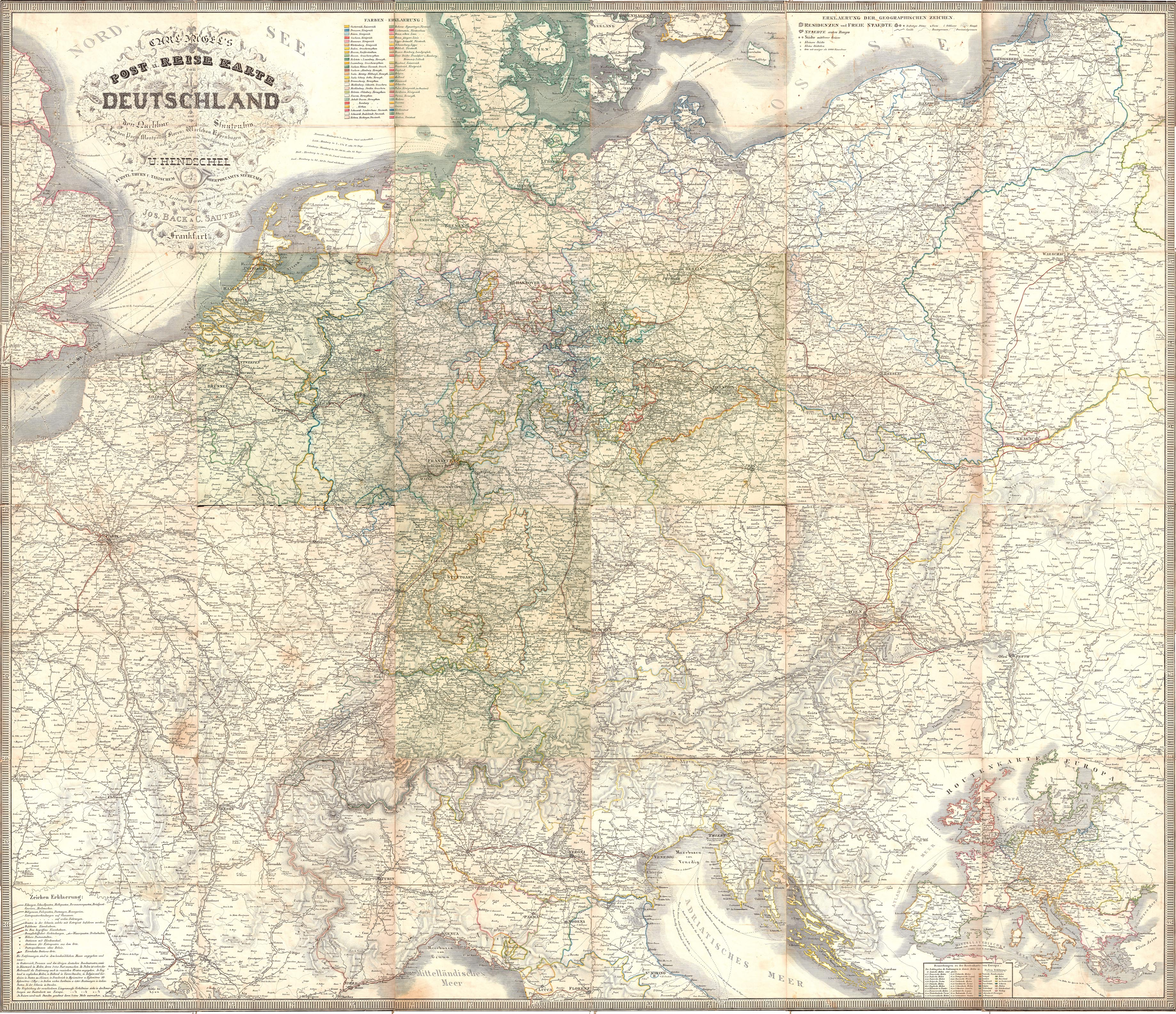 Thurn-und-Taxis-Post vor 1850 Carl Jügel's Post-Reise-Karte von Deutschland und den Nachbar-Staaten: bis London, Paris, Montpellier,.. Ca. 1:1.300.000 Frankfurt am Main, Carl Jügel, 1843 Eine Karte auf vier Bl.: Kupferstich; Gesamtgröße 123 * 105 cm